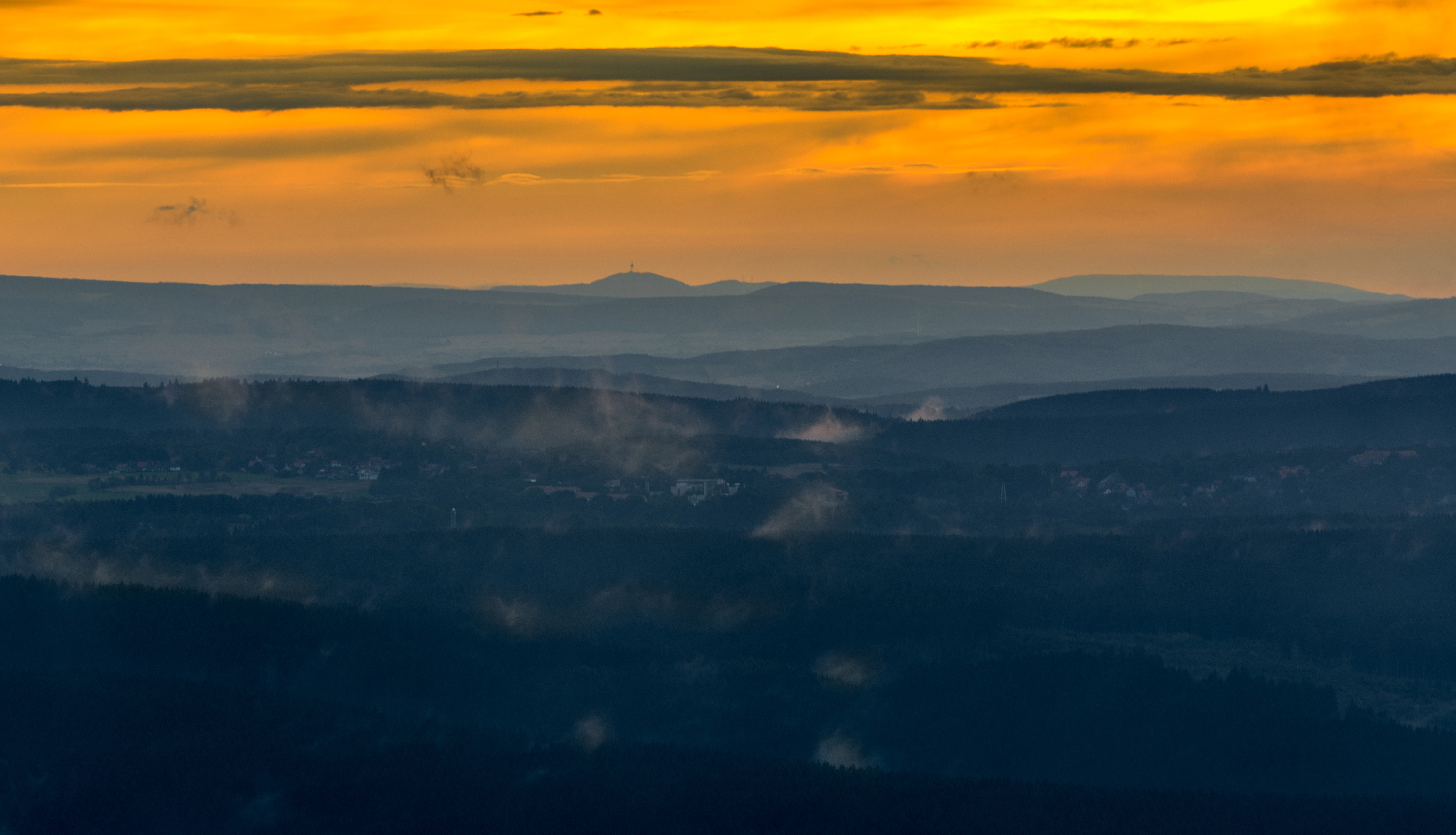 Blick von der Wolfswarte im Harz zum Köterberg